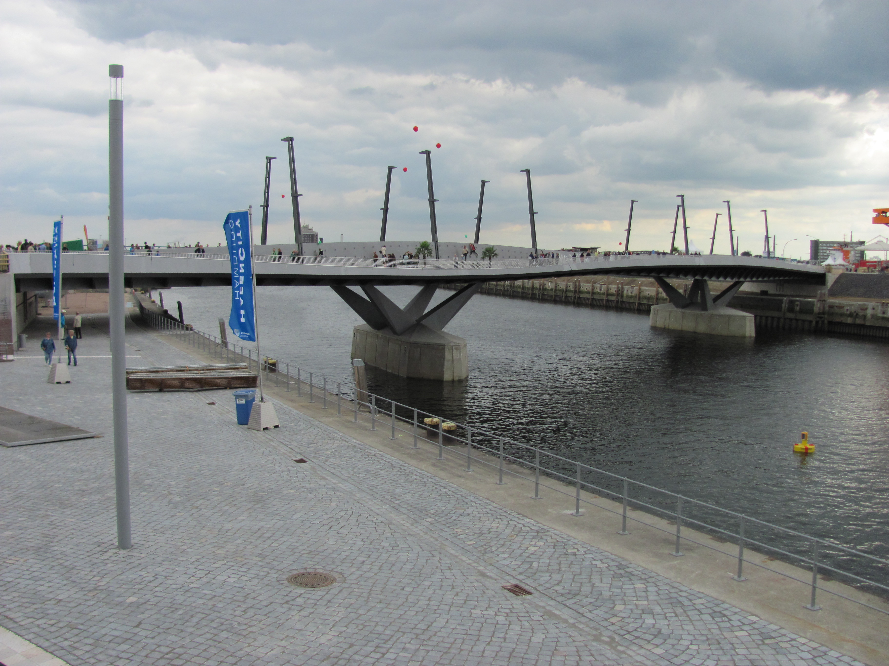 Baakenhafenbrücke in Hamburg-HafenCity einen Tag nach der Eröffnung am 10. August 2013